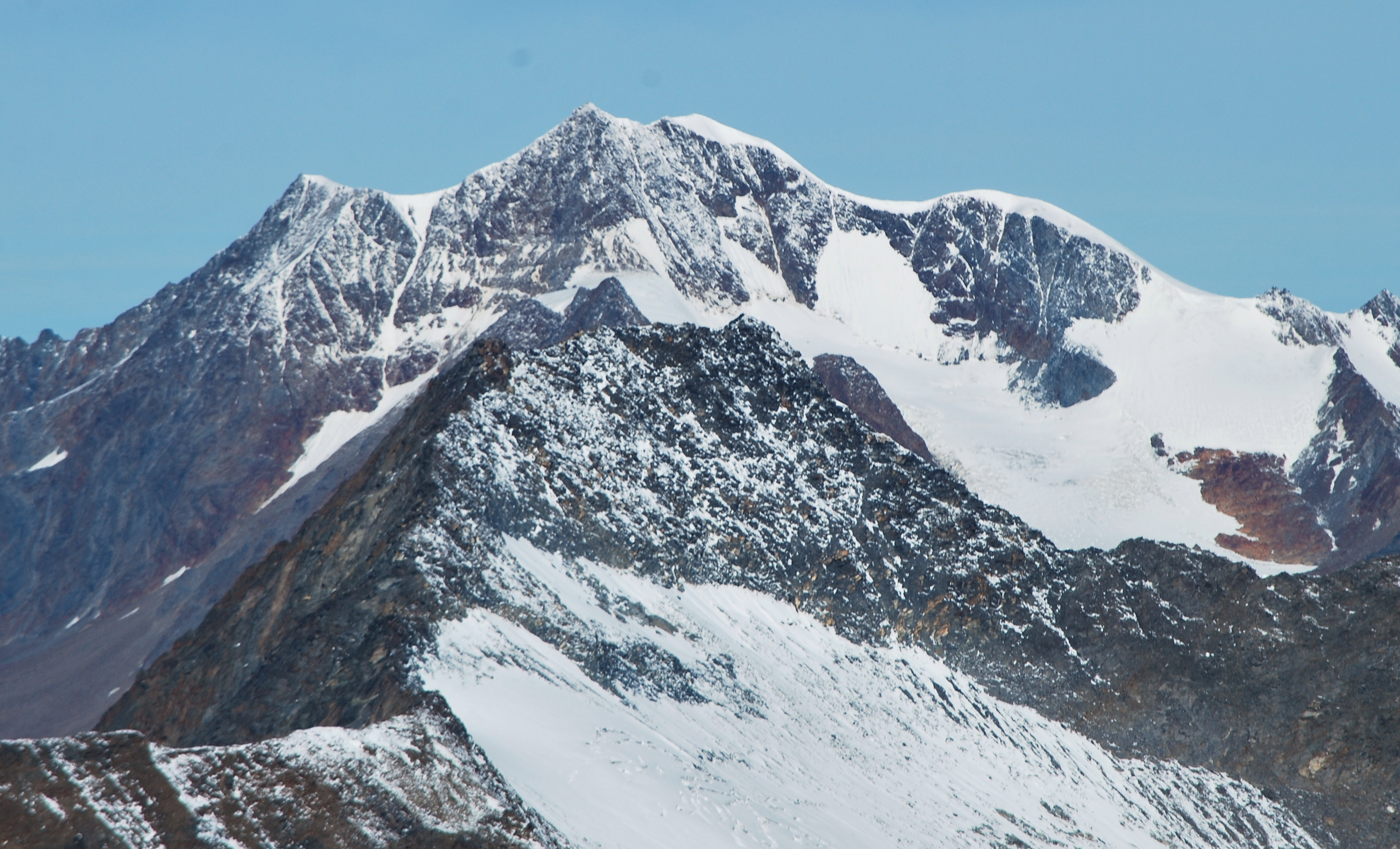 Wildspitze, Firmisanschneide von SO (Hochwilde)